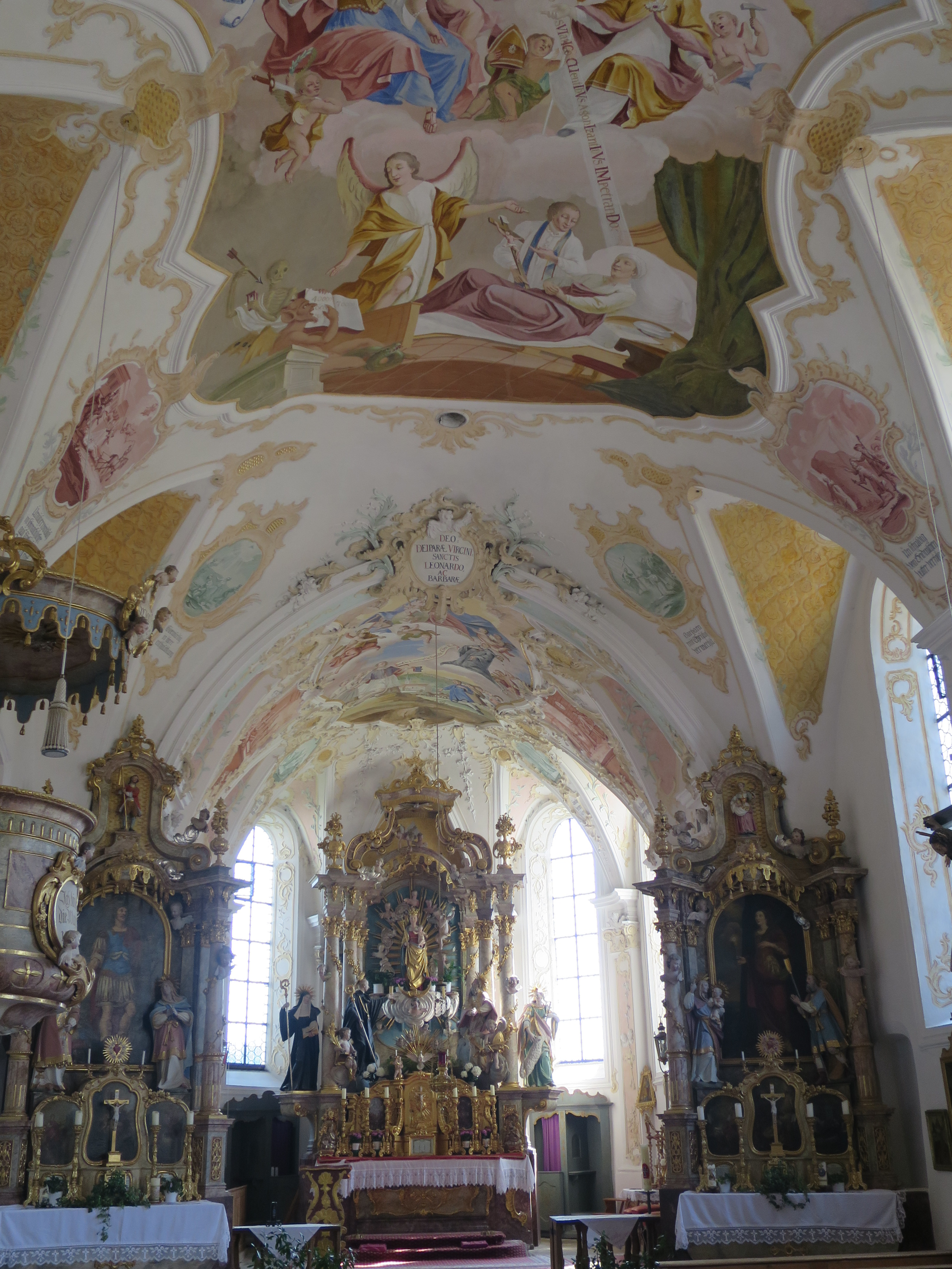 Innenraum der Kirche St. Leonhard in Reichersdorf.